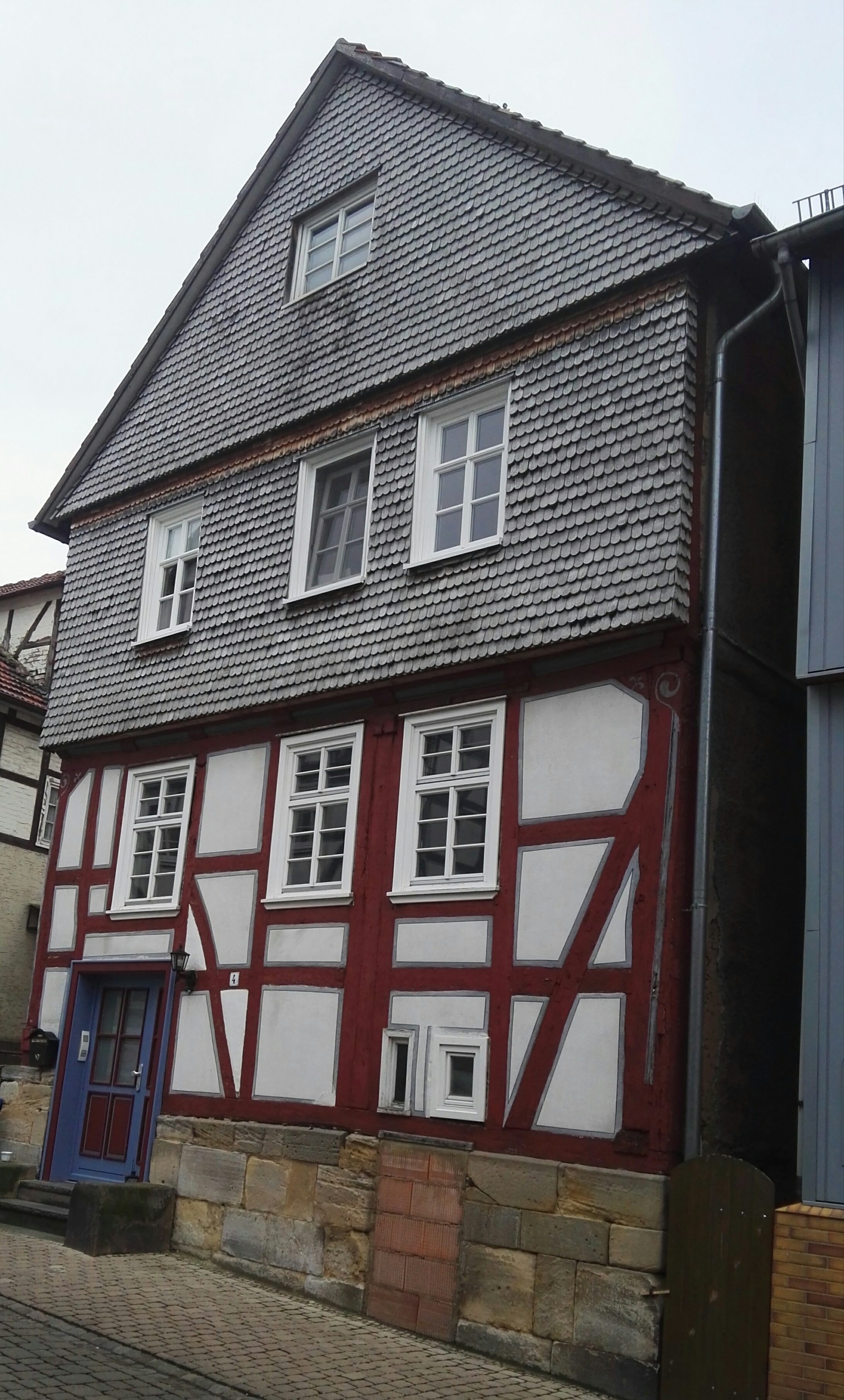 Ehemaliges Wohnhaus der Familie Weinstein in Felsberg